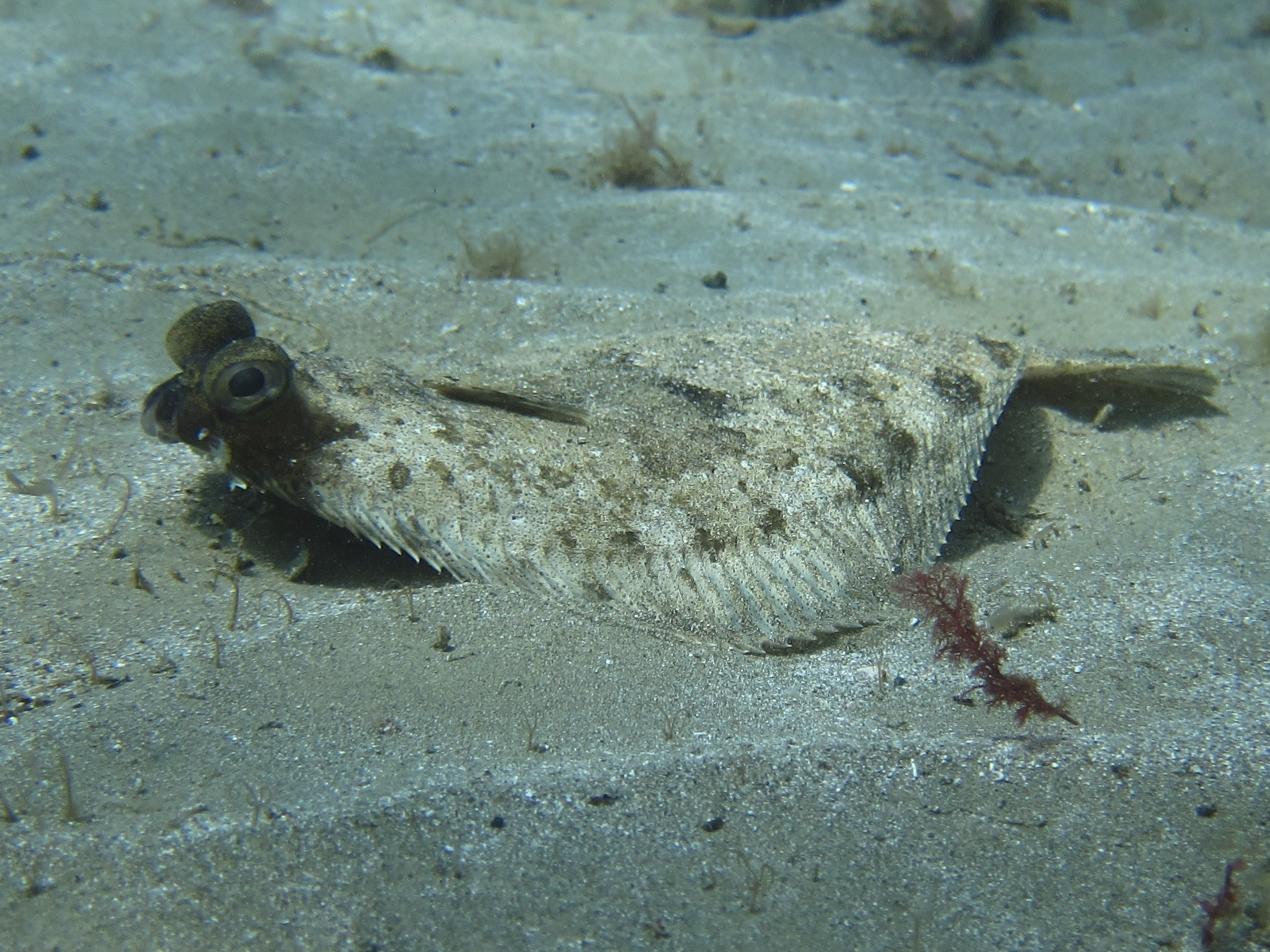 Flounder